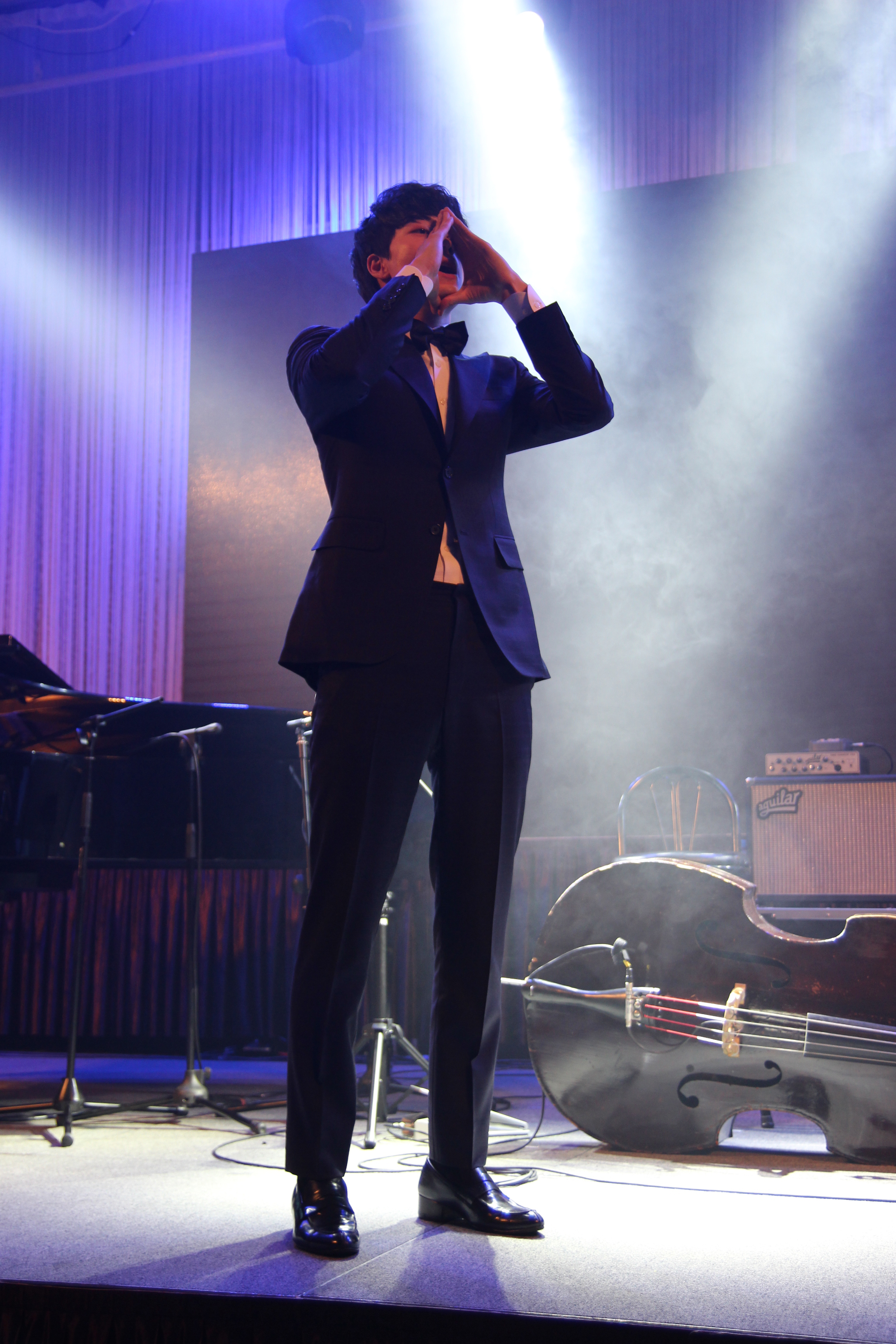 2015년 4월 17일 플라자호텔 그랜드볼룸에서 열린 콘서트 ‘윤한 & I’에서 피아니스트 겸 싱어송라이터 윤한이 열창하고 있다.